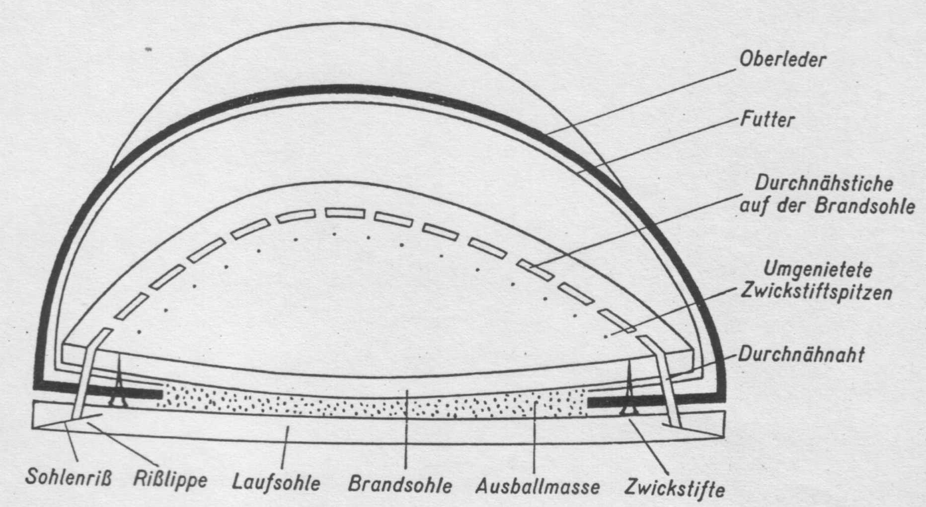 Querschnittschema eines durchgenähten Schuhs